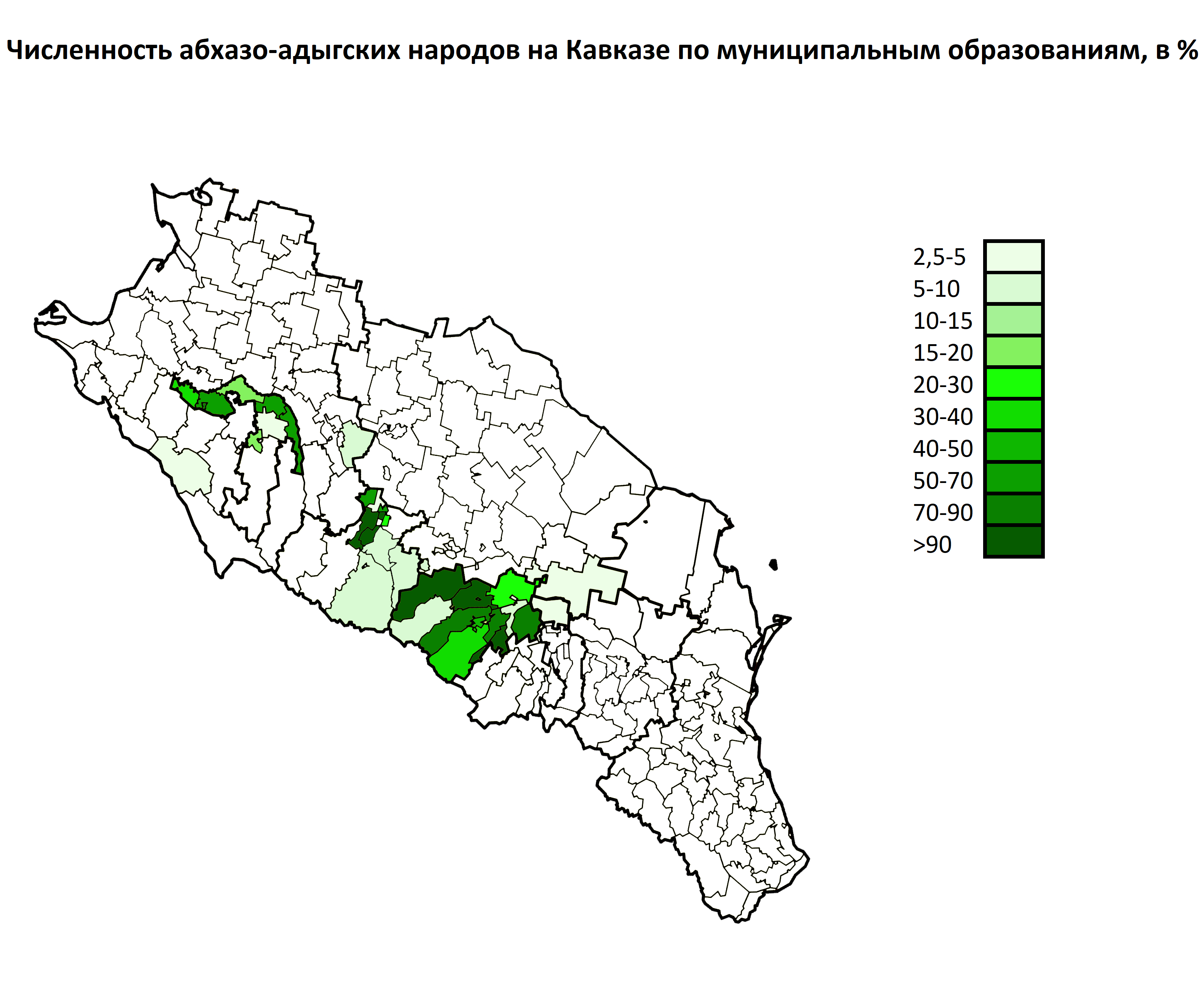 Численность абхазо-адыгских народов на Кавказе по муниципальным образованиям, в %